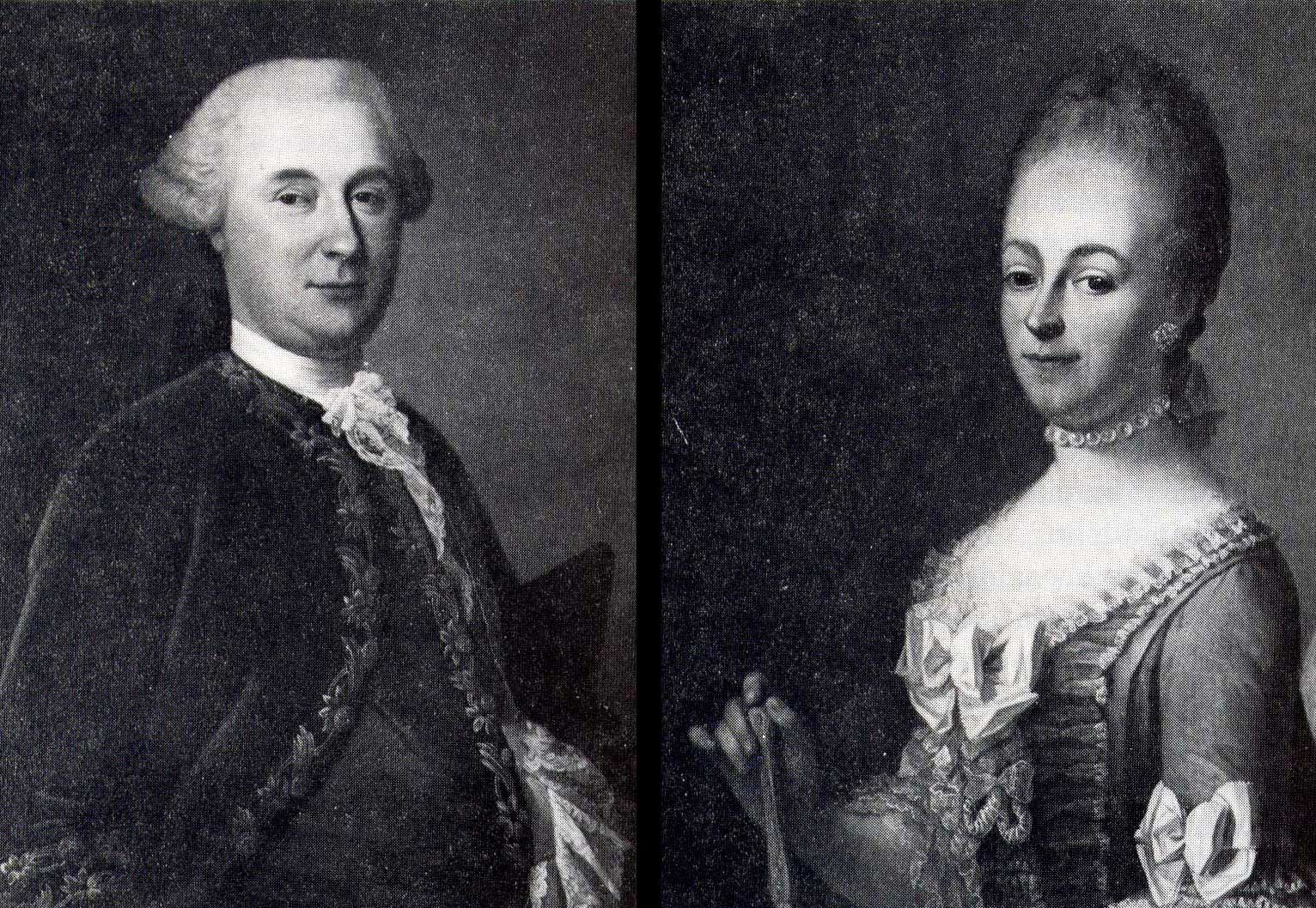 Portretten van Coenraad Wolter Ellents (1720-1784) en Gesina Oldenhuis (1730-1818)